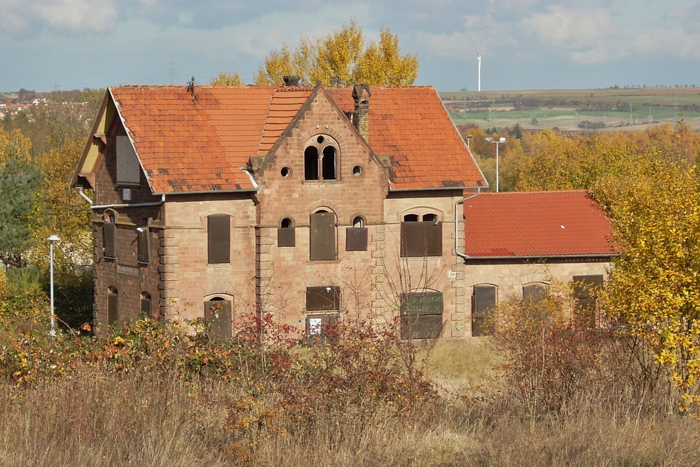 Der 1894 errichtete Bahnhof von Hettenleidelheim